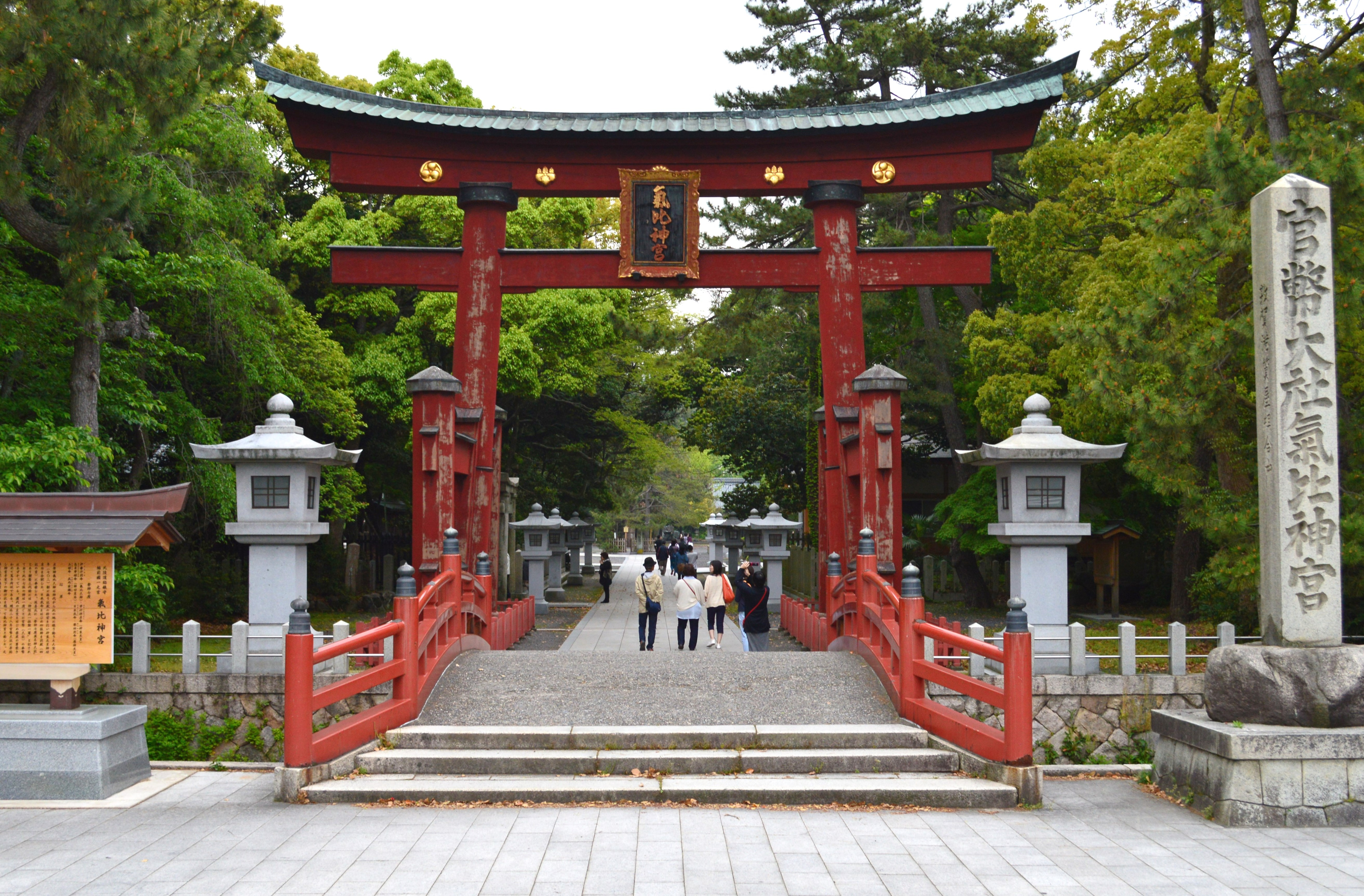 氣比神宮 大鳥居